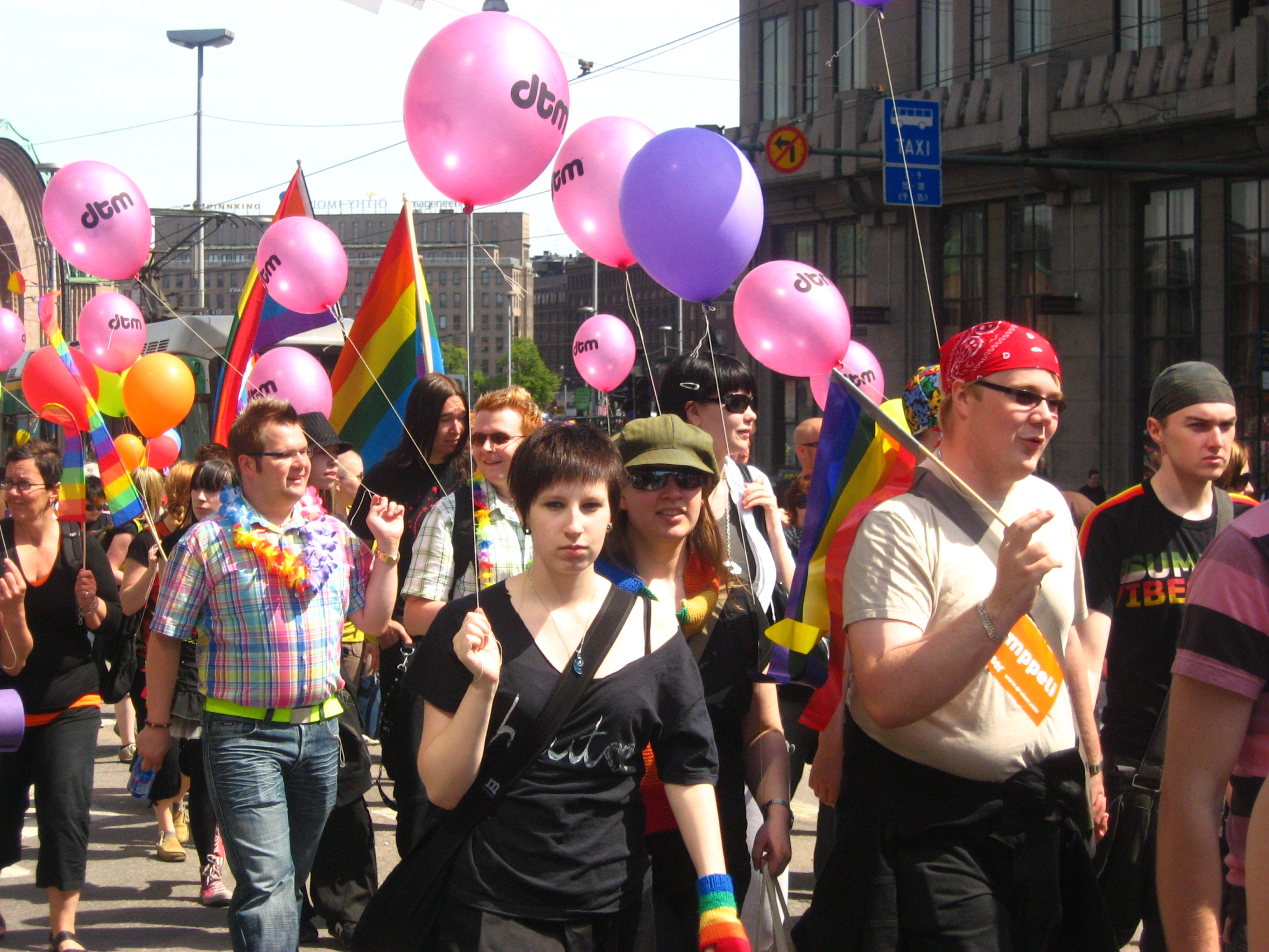 Stare Helsinki Pride